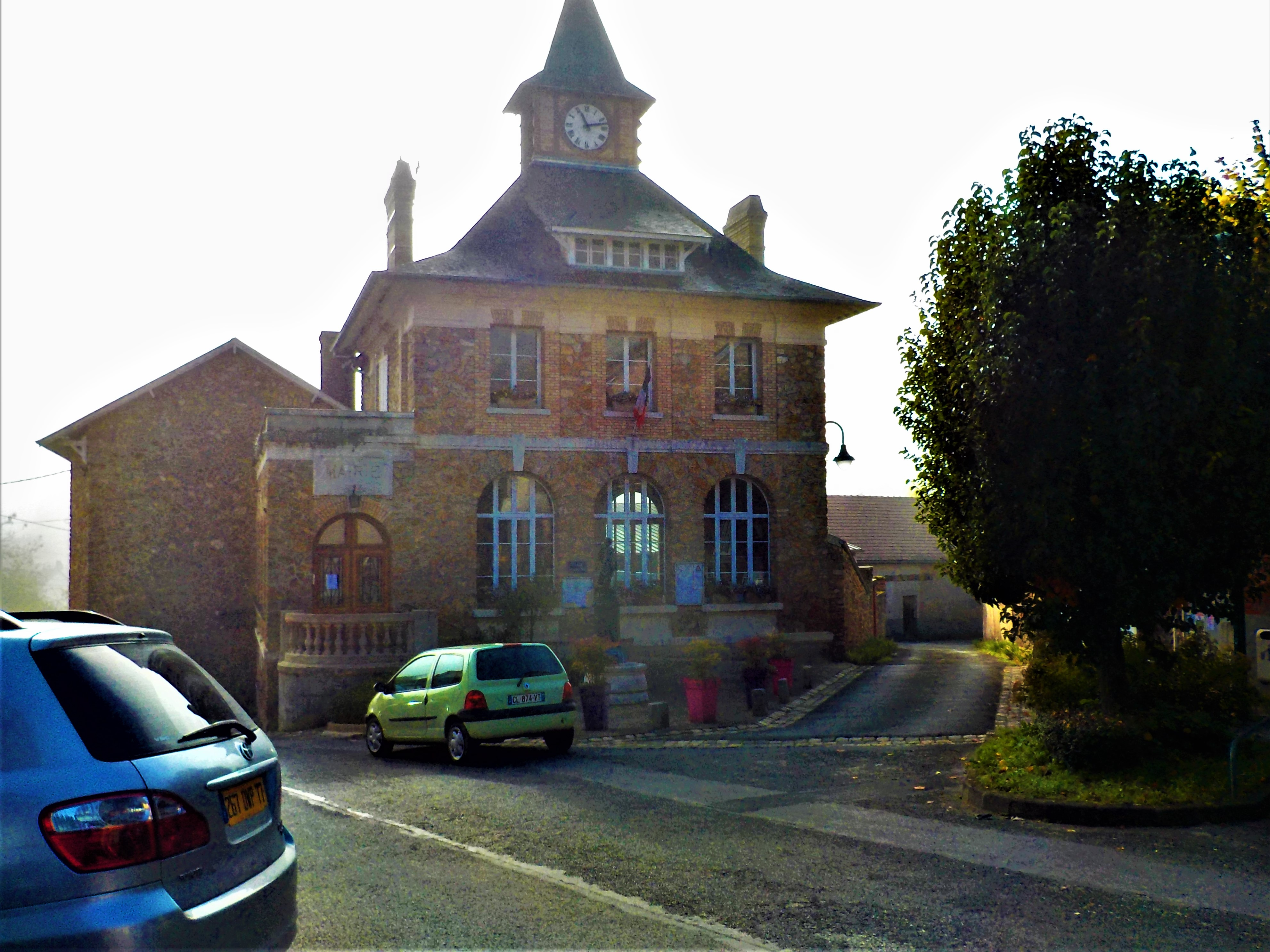 La Mairie de Jaulgonne, une mâtiné d'automne.